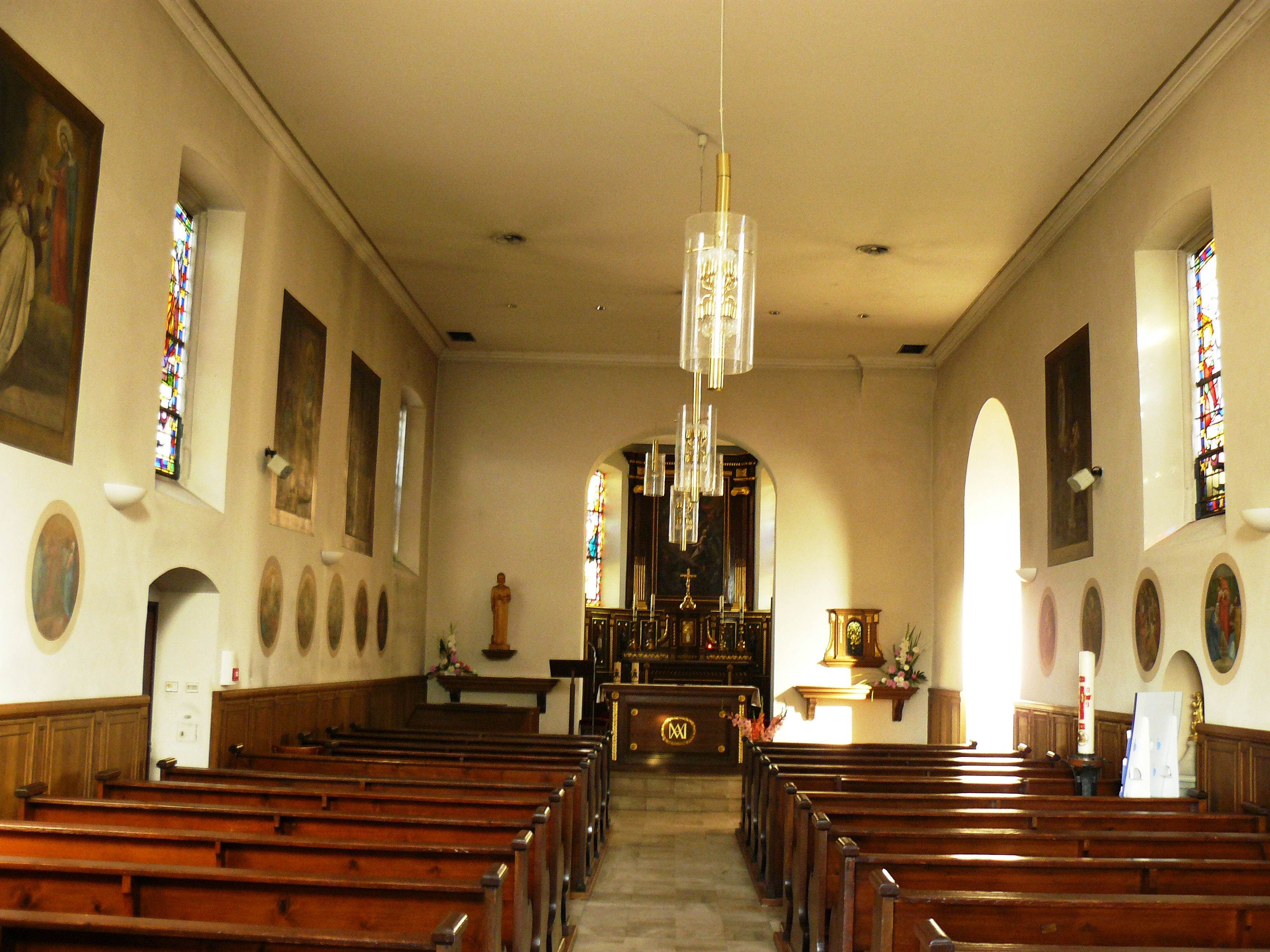 Intérieur de l'Église paroissiale Notre-Dame de Neunkirch